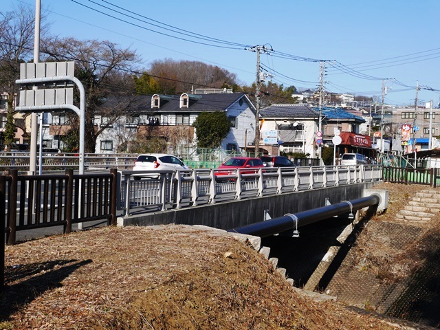 国道16号 両国橋（神奈川県相模原市緑区-東京都町田市）